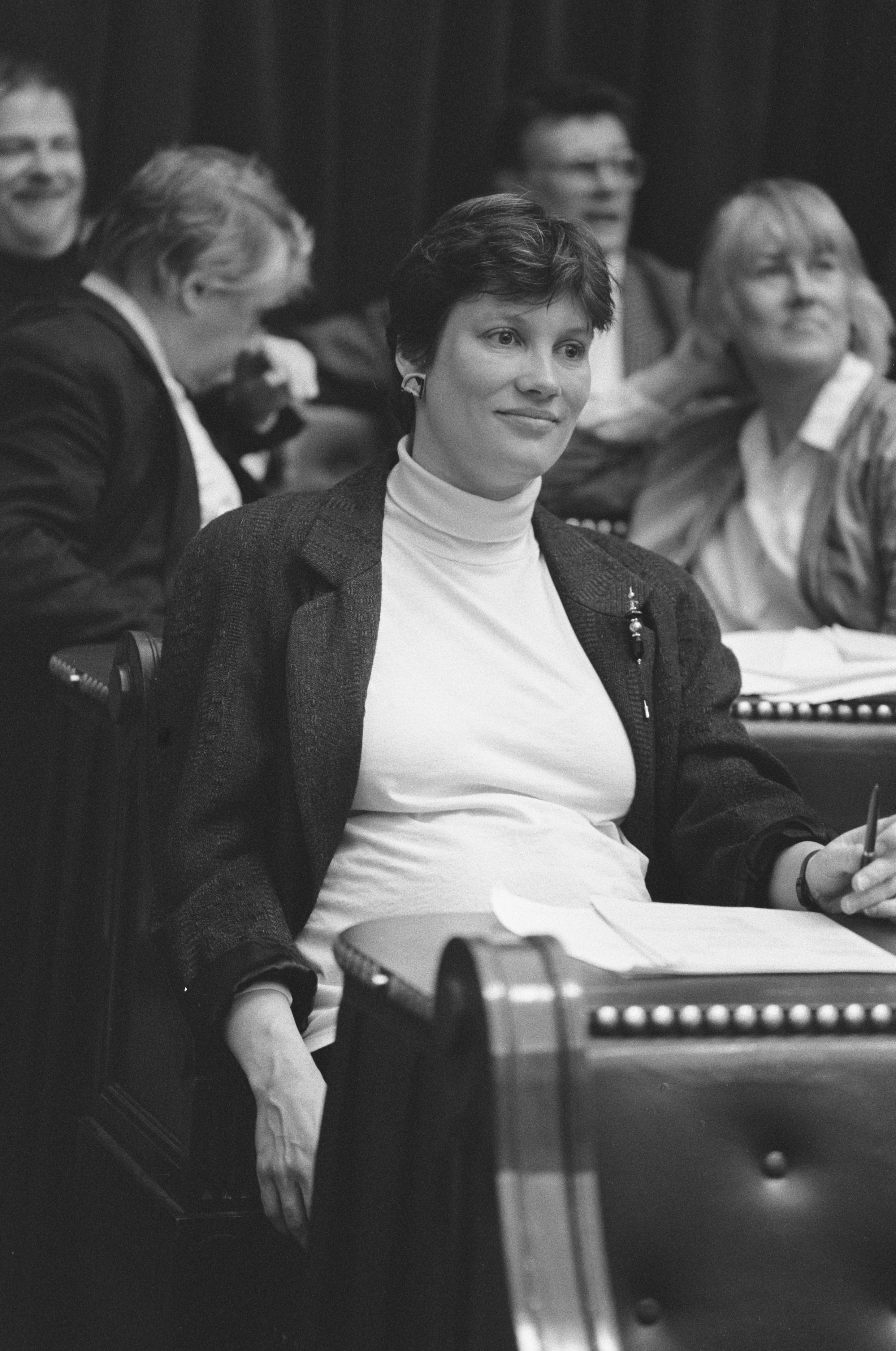 Collectie / Archief : Fotocollectie Anefo Reportage / Serie : [ onbekend ] Beschrijving : Zwangere Andrée van Es (PSP) in Tweede Kamer Datum : 12 april 1988 Trefwoorden : politiek, zwangerschappen Persoonsnaam : Es, Andrée van Instellingsnaam : PSP Fotograaf : Bogaerts, Rob / Anefo Auteursrechthebbende : Nationaal Archief Materiaalsoort : Negatief (zwart/wit) Nummer archiefinventaris : bekijk toegang 2.24.01.05 Bestanddeelnummer : 934-2284